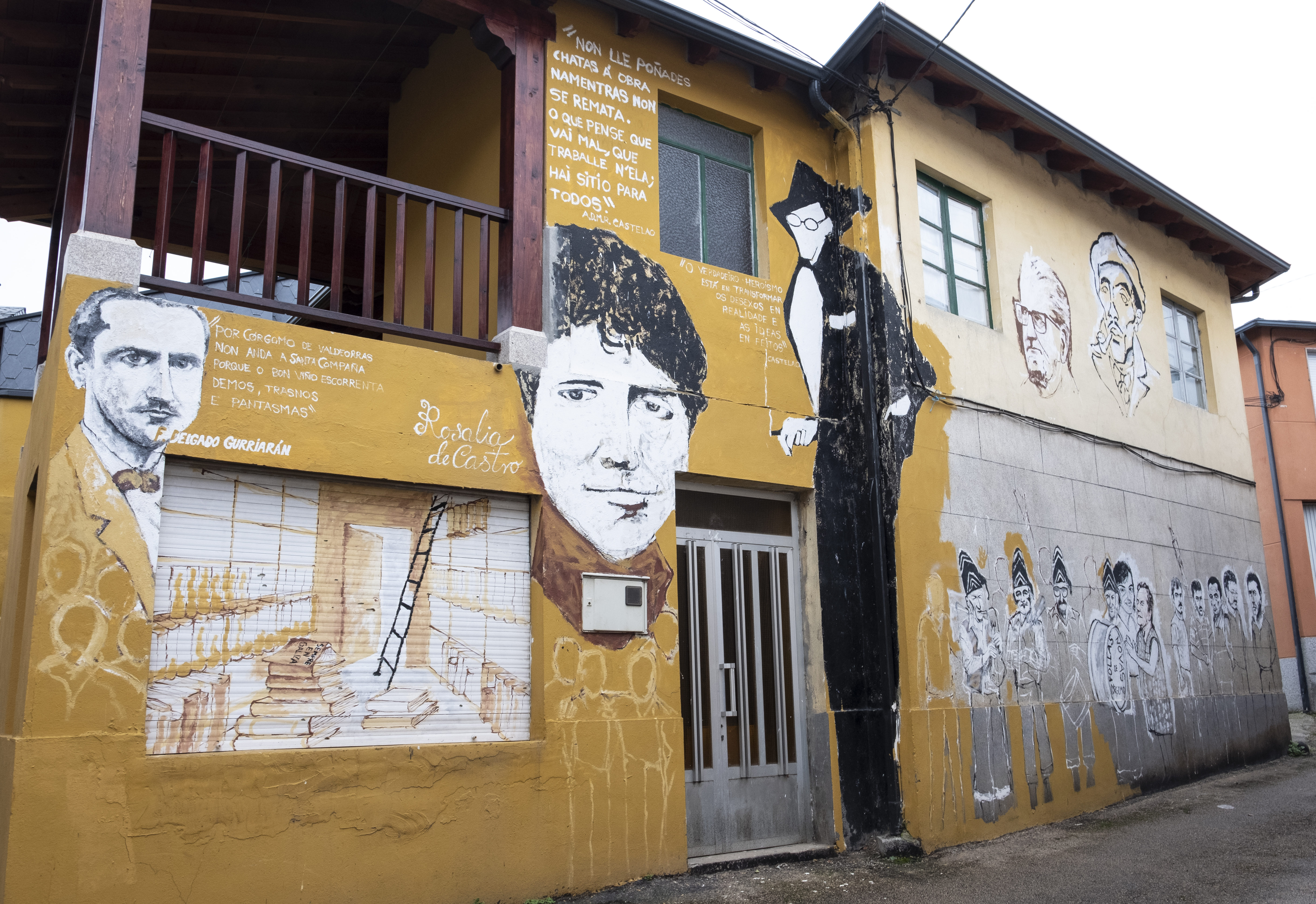 Mural en Córgomo, Vilamartín de Valdeorras